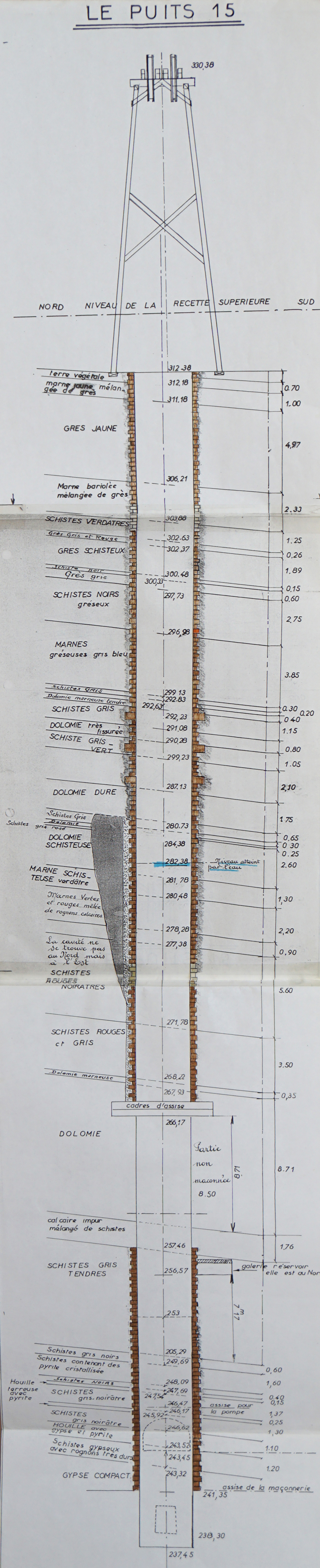 Coupe du puits n° 15 de Gouhenans.